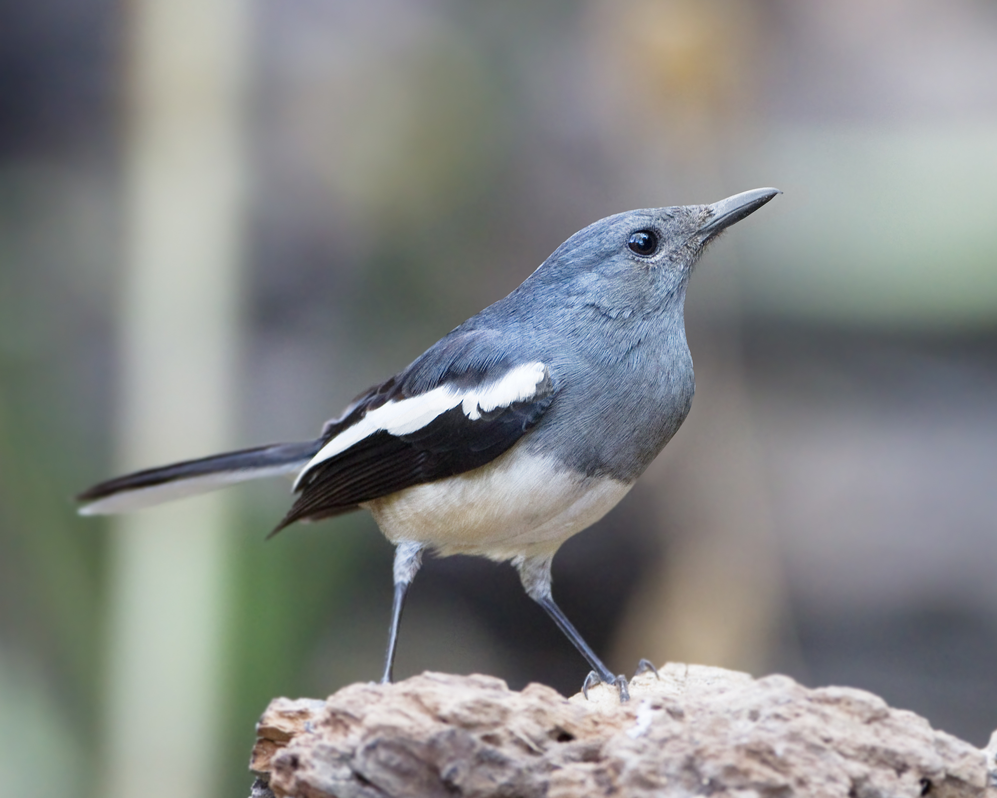 Oriental Magpie Robin (Copsychus saularis) female, Royal Agricultural Station, Ang Khang, Mon Pin, Chiang Mai, Thailand